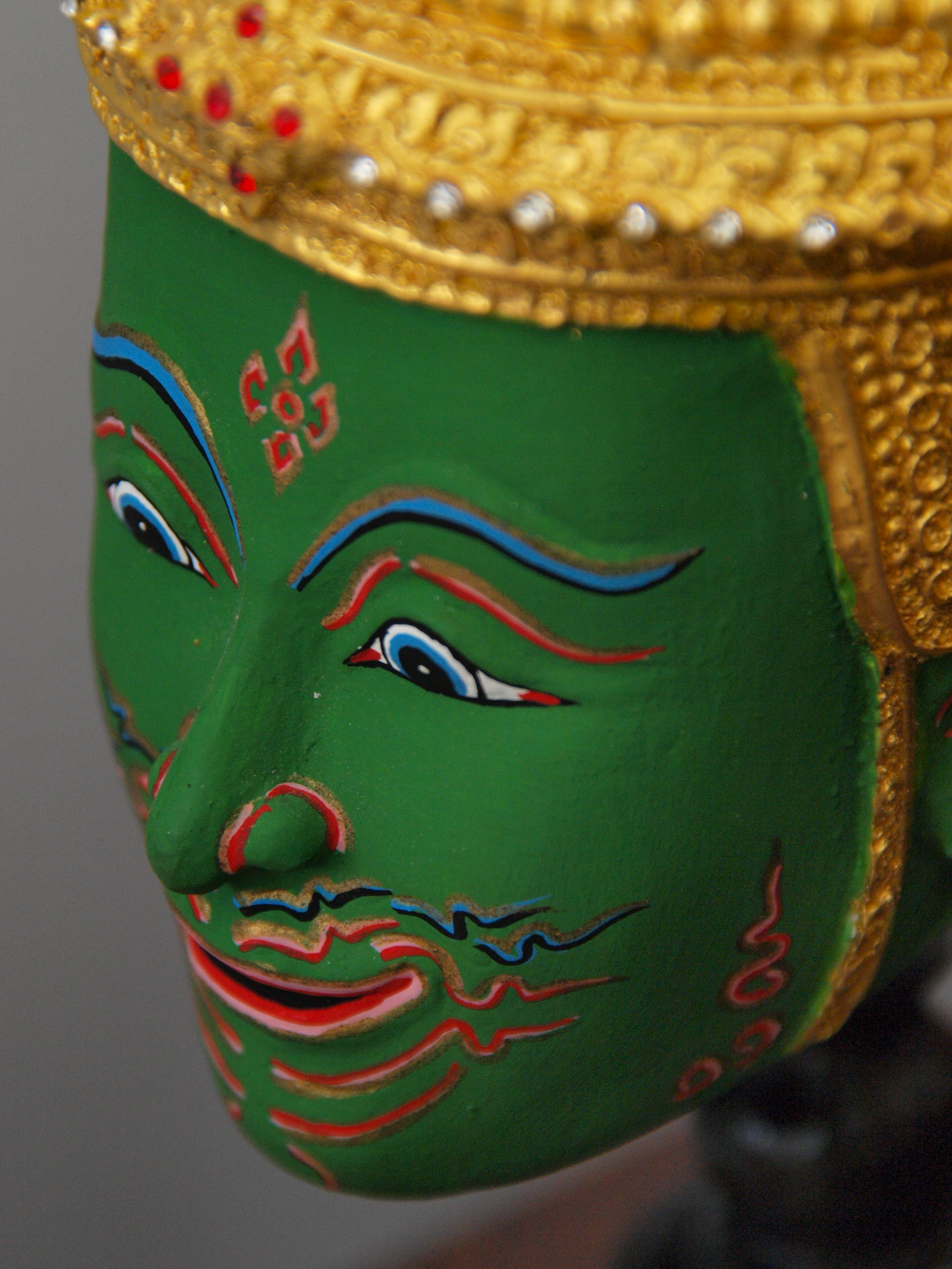 ภาพถ่ายหัวโขนหน้ามนุษย์ ตัวพระราม ถ่ายจากงาน "กรุงเทพฯ ถนนวัฒนธรรม" ของดีเขตบางพลัด ระหว่างวันที่ 1-5 กันยายน 2553